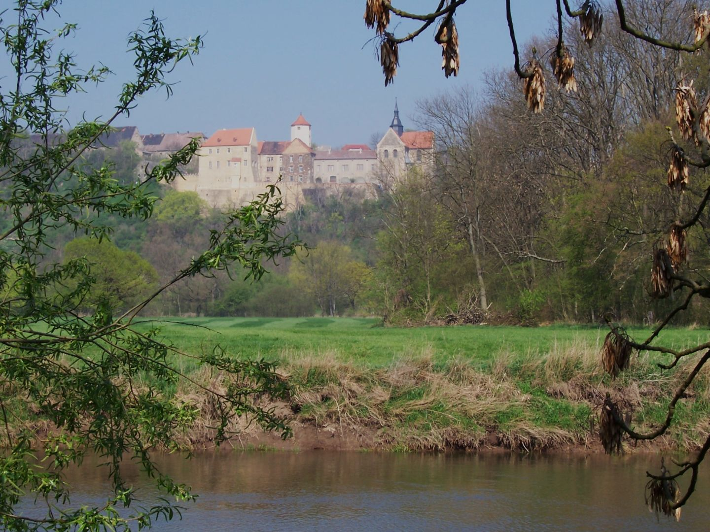 Blick vom rechten Saaleufer auf das Schloss